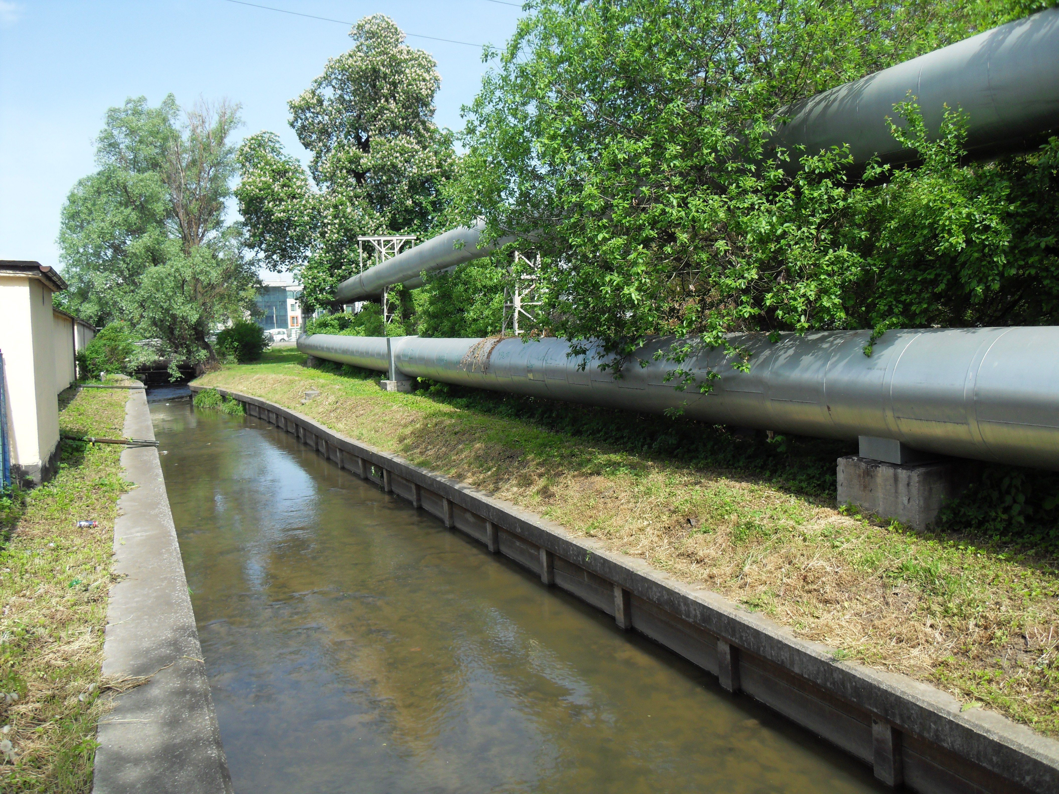 Gdańsk Młyniska, struga Strzyża.